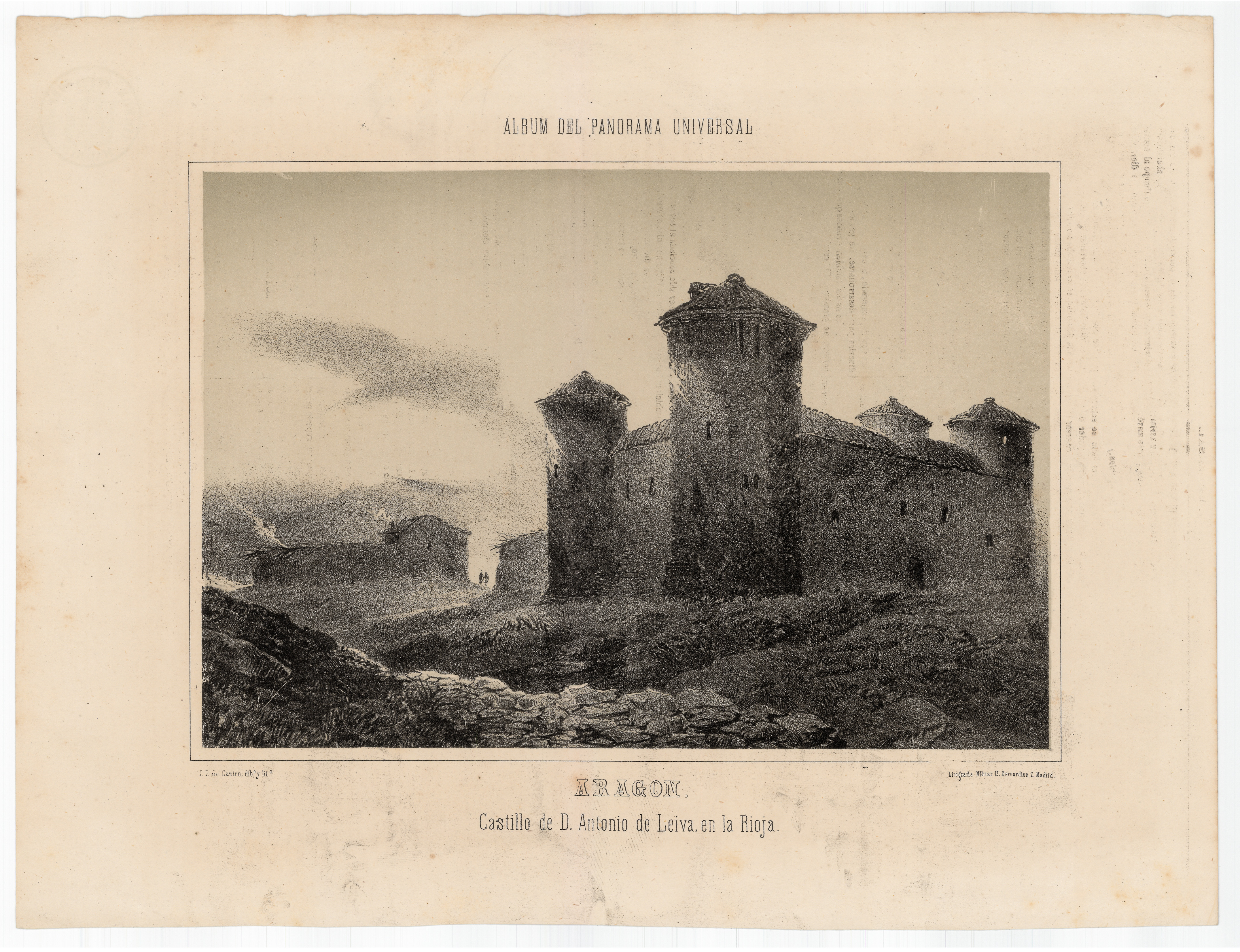 Aragon. Castillo de D. Antonio de Leiva, en la Rioja / Pedro Pérez de Castro dib. y lit..